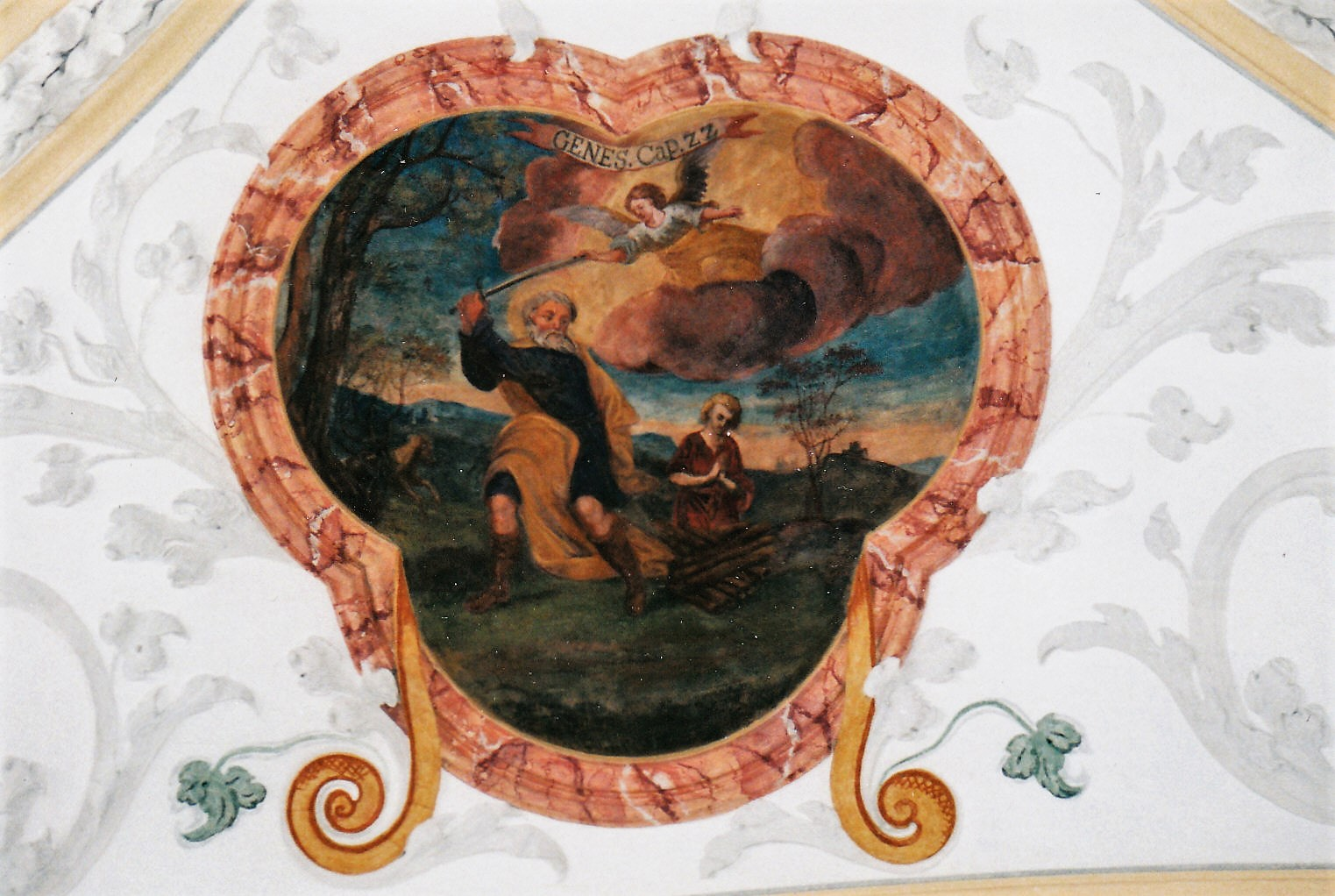 Barocke Deckenfresken in St. Adelgundis in Anhausen (Diedorf): Ein Engel hindert Abraham daran, seinen Sohn Isaak zu opfern; stattdessen bringt er einen Widder als Brandopfer dar